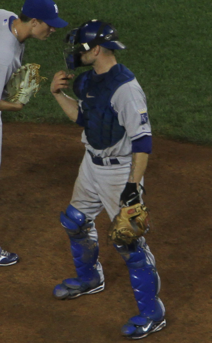 Jason Kendall